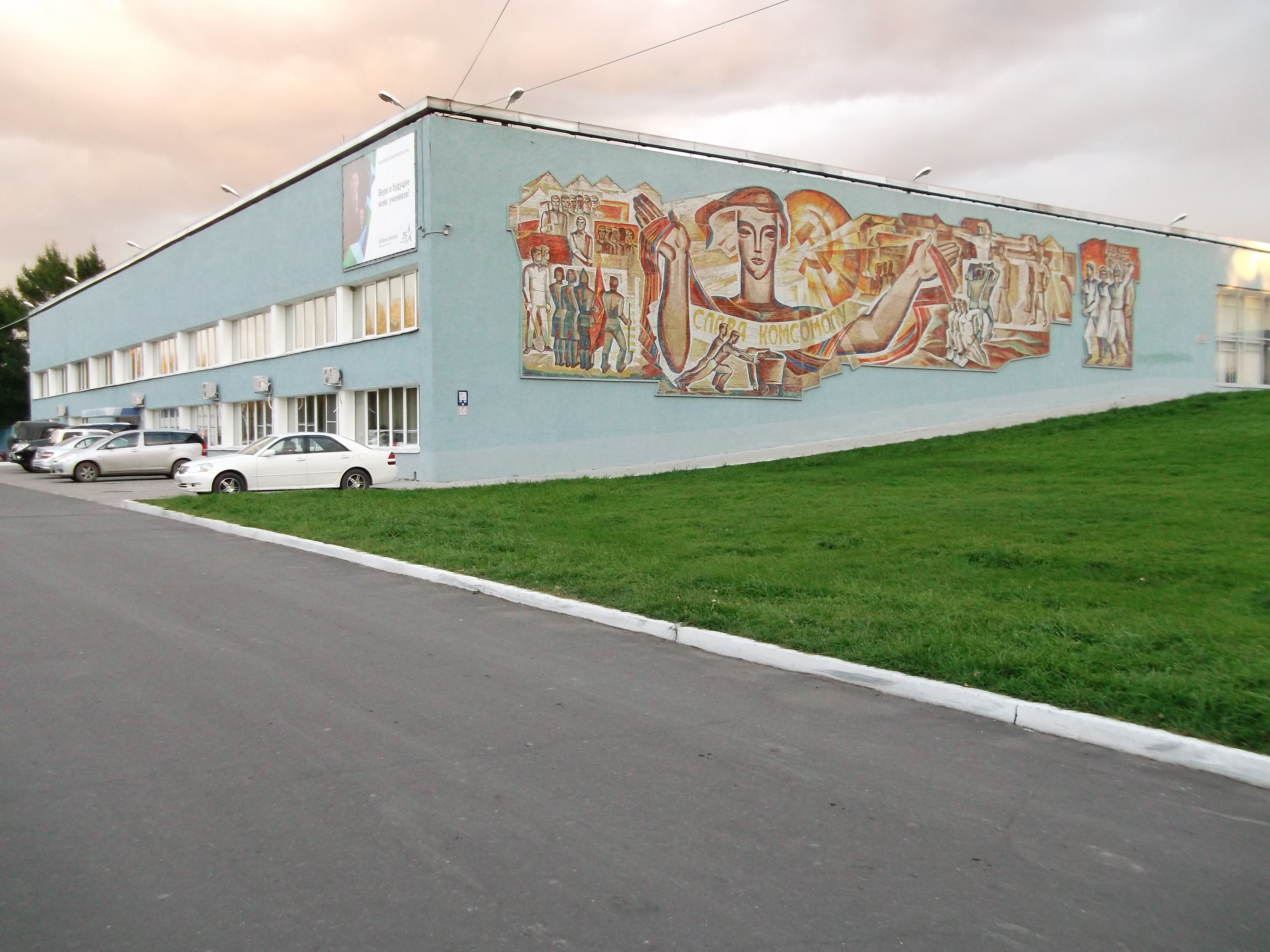 Здание дома молодежи, которое посетил Ю. А. Гагарин (Хабаровский край, Комсомольск-на-Амуре, Мира пр., 2)